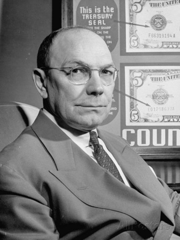 Photo de Frank J. Wilson